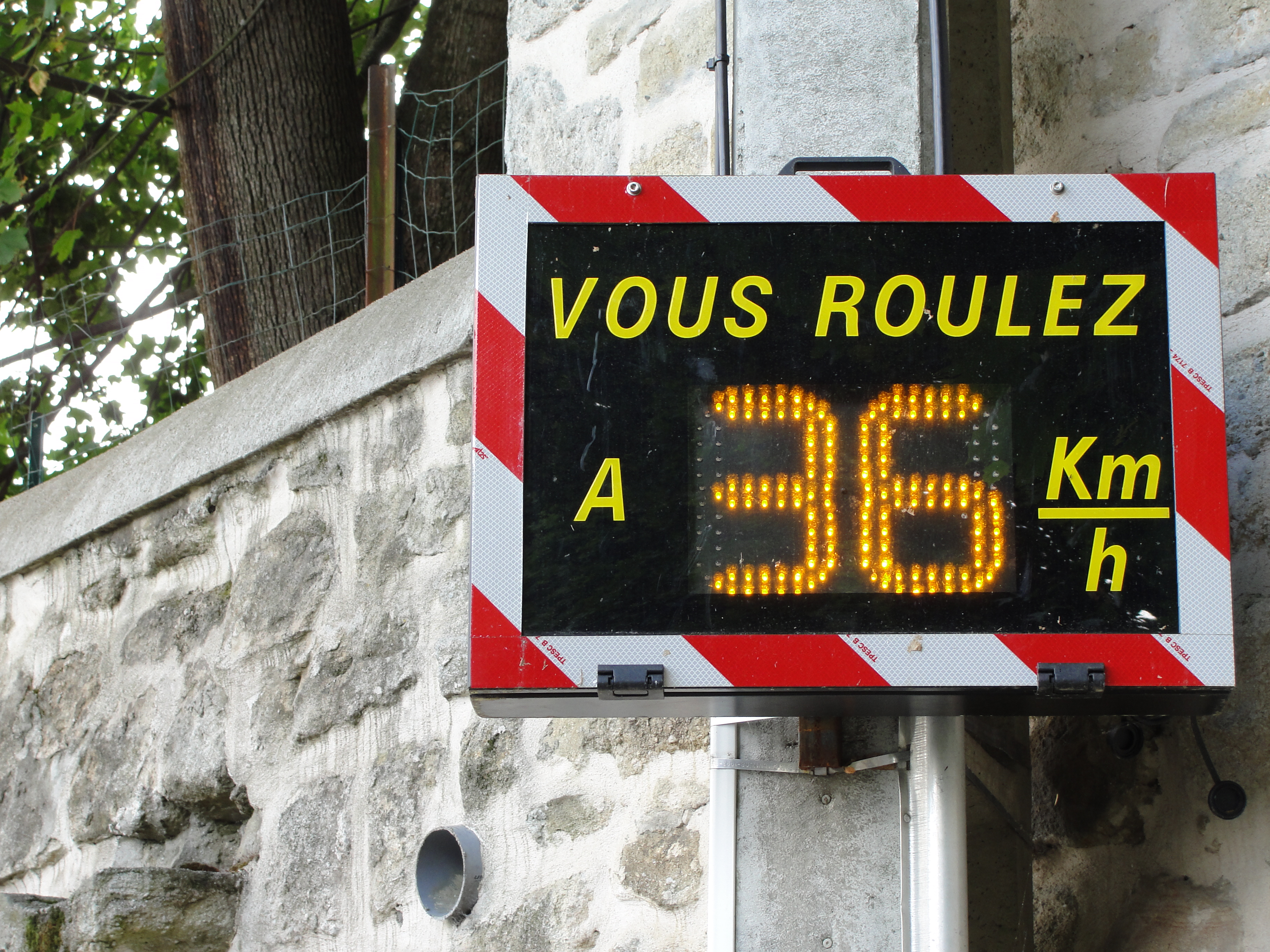 Panneau indicateur de vitesse en sortie d'une localité française, incitant les automobilistes à lever le pied.